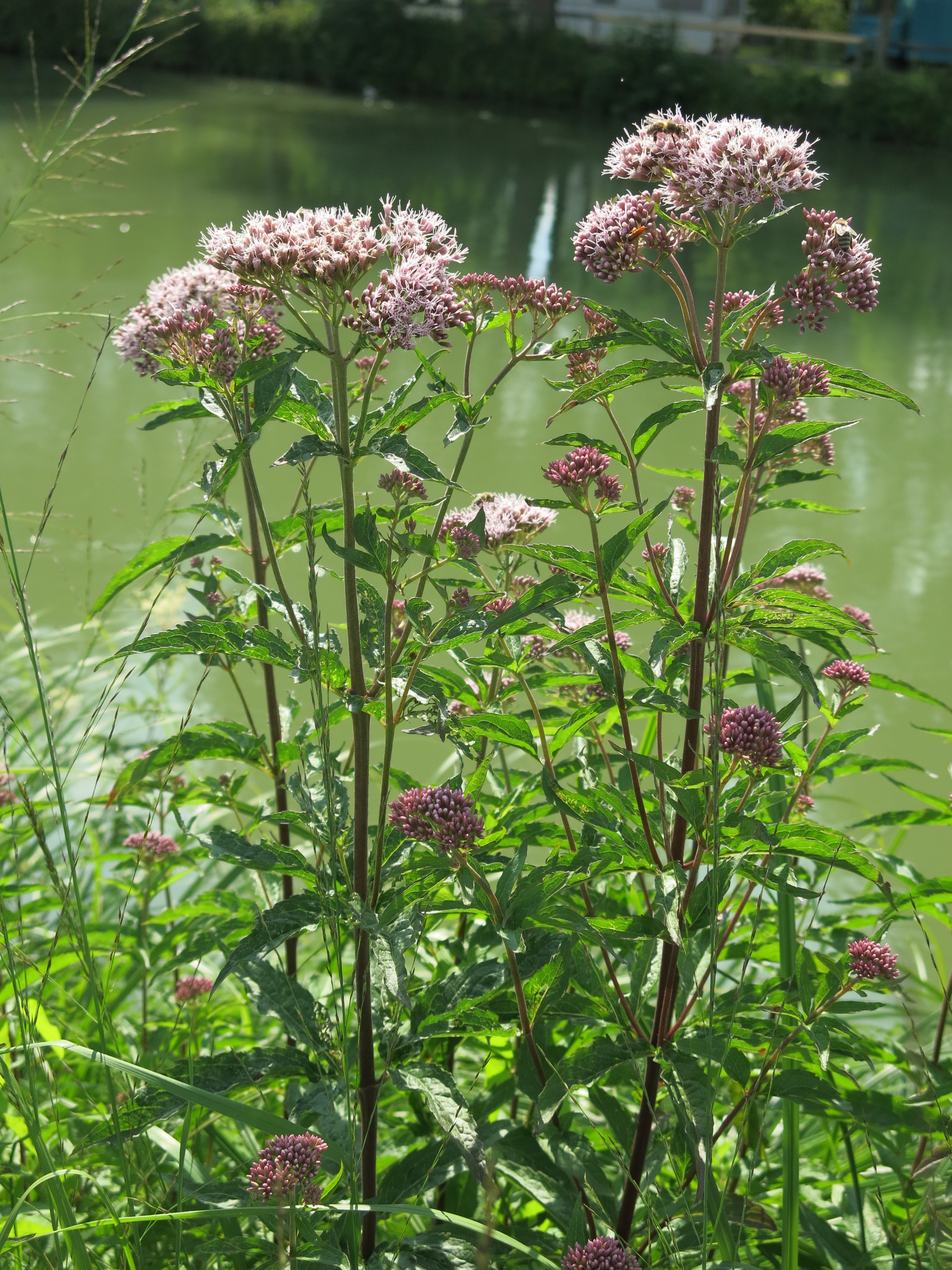 Gewöhnlicher Wasserdost (Eupatorium cannabinum) am Uferrand der Isar